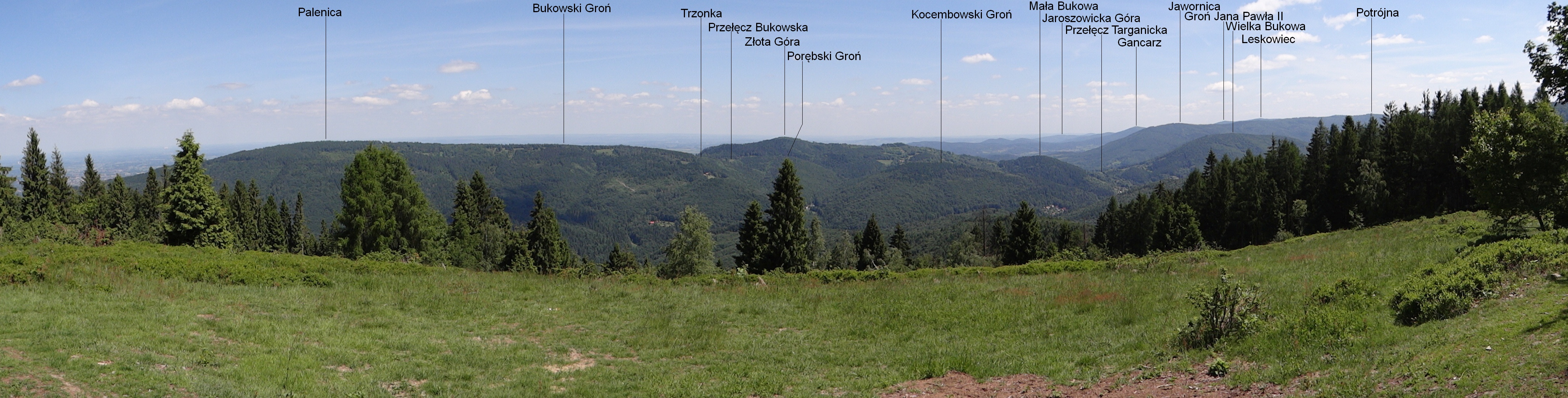 Panorama widokowa z Kiczery w kierunku północnym i wschodnim